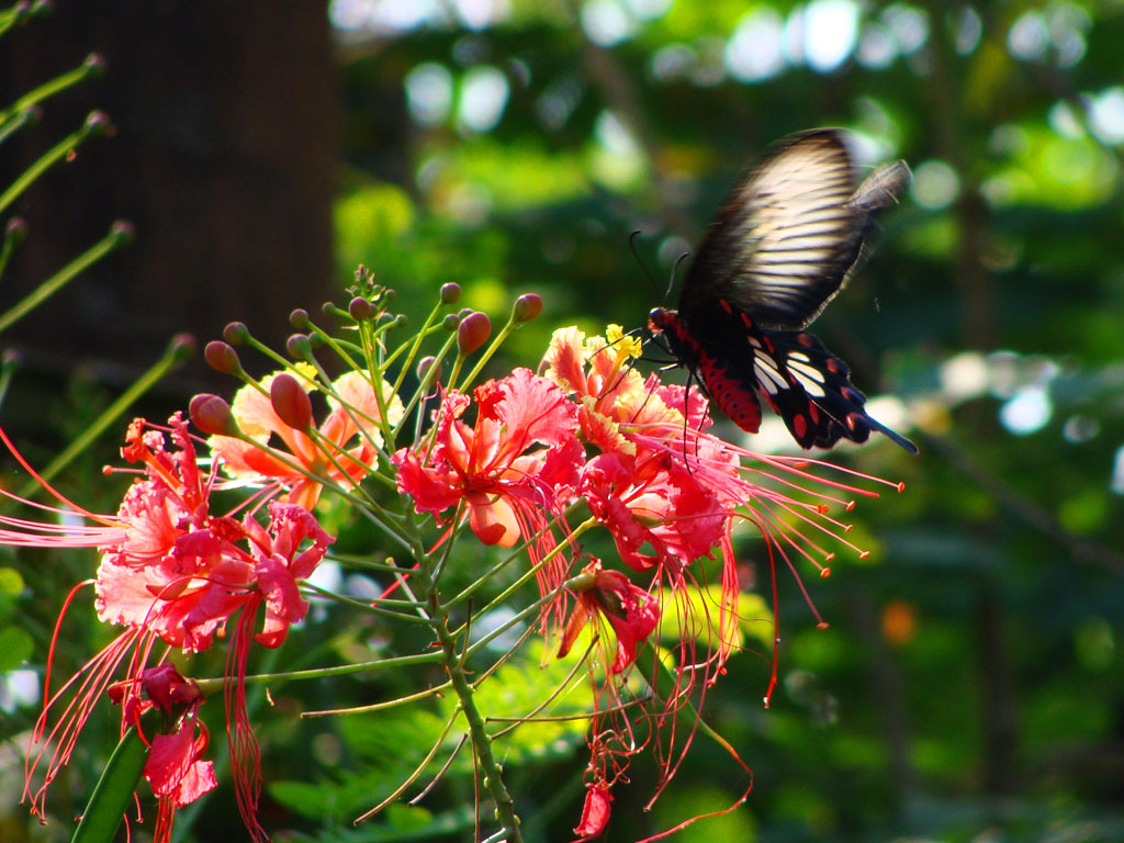 രാജമല്ലി പൂക്കളില്‍ നിന്നും തേന്‍ നുകരുന്ന ശലഭം